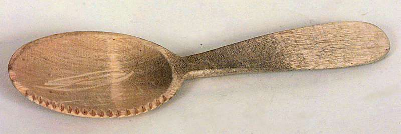 Smørskje fra Oslo laget av bjørk. Lengde 20,4 cm. Foto: Anne-Lise Reinsfelt / Norsk Folkemuseum, NF.1965-0248.